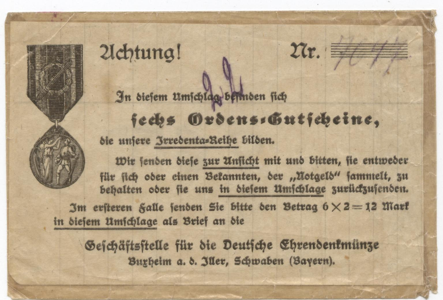 Tütchen zu Notgeldscheinen Deutsche Ehrendenkmünze des Weltkriegs